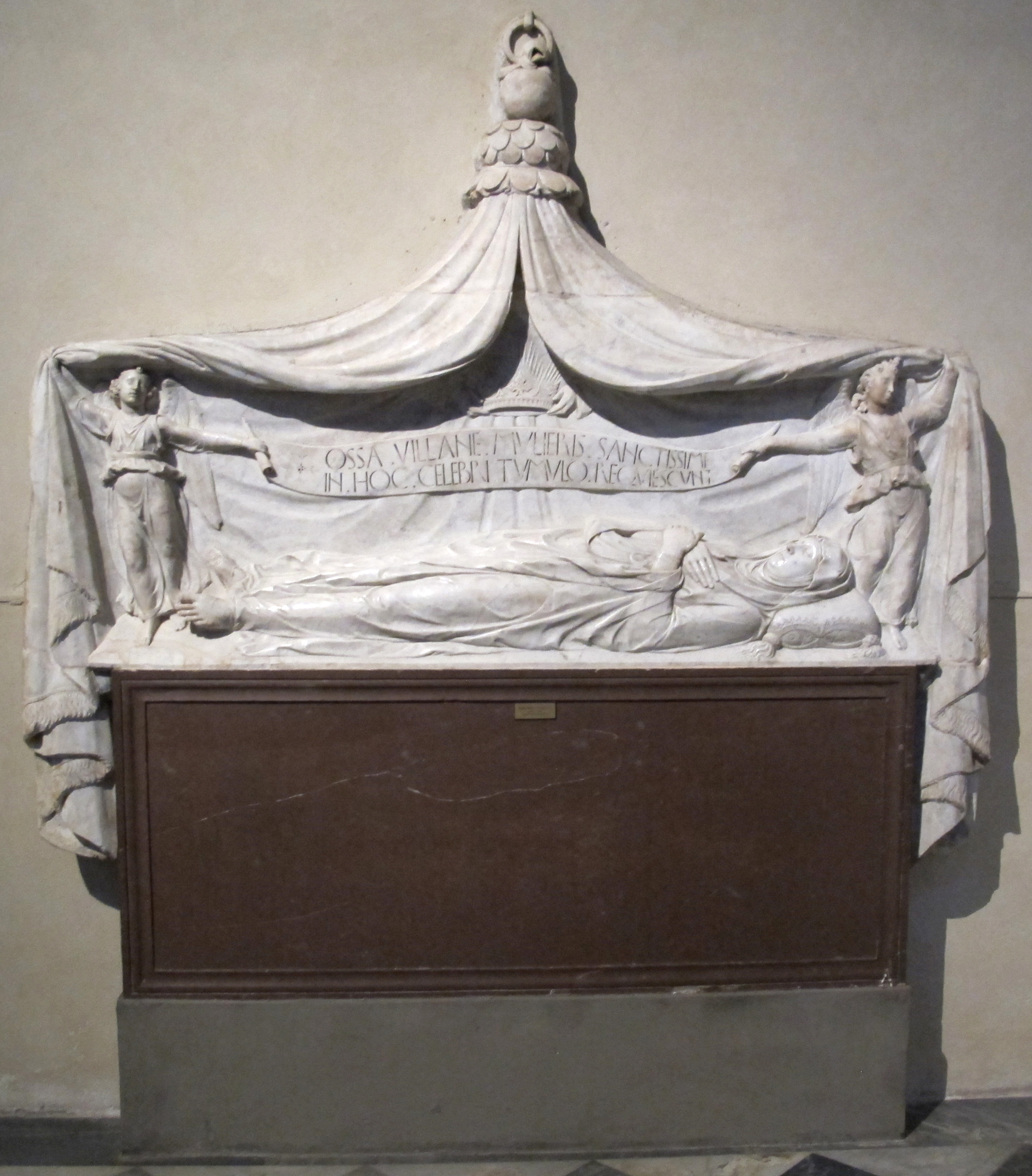 Smn, navata dx, bernardo rossellino, monum. della beata villana de' botti, 1451